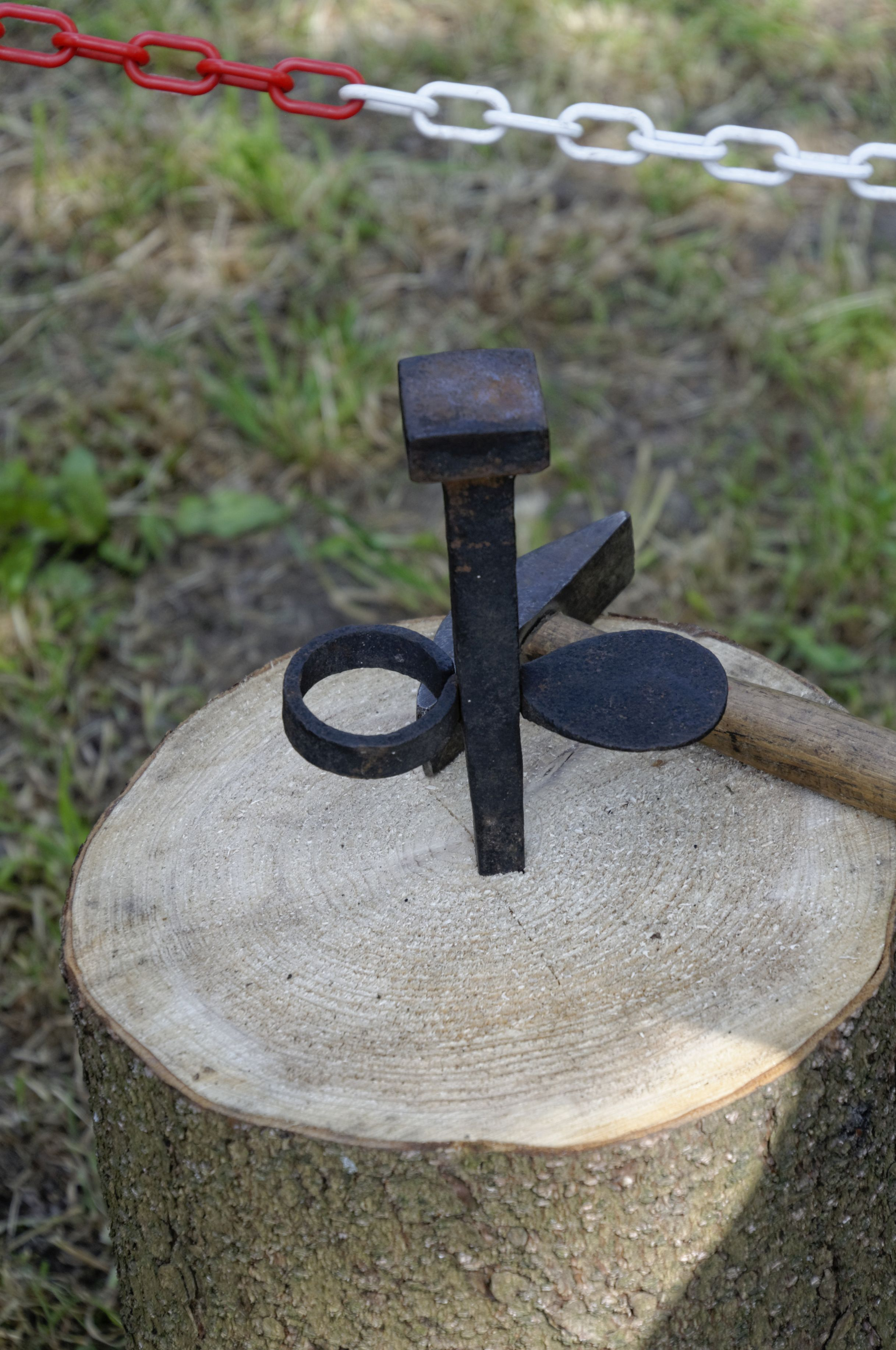 Die Oldtimerfreunde Westersode und Umgebung e. V. luden Besitzer alter Traktoren, PKW, LKW, Motorräder und landwirtschaftlicher Geräte zur großen Oldtimer-Ausstellung mit Teilemarkt und Vorführung historischer Technik ein.